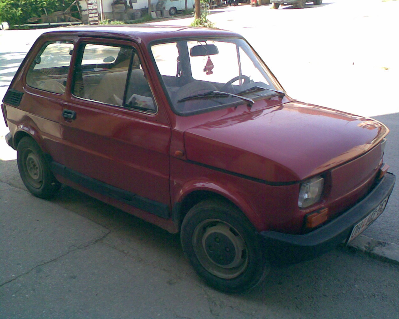 Polski Fiat 126p FL or Zastava 126 PGL in Macedonia.